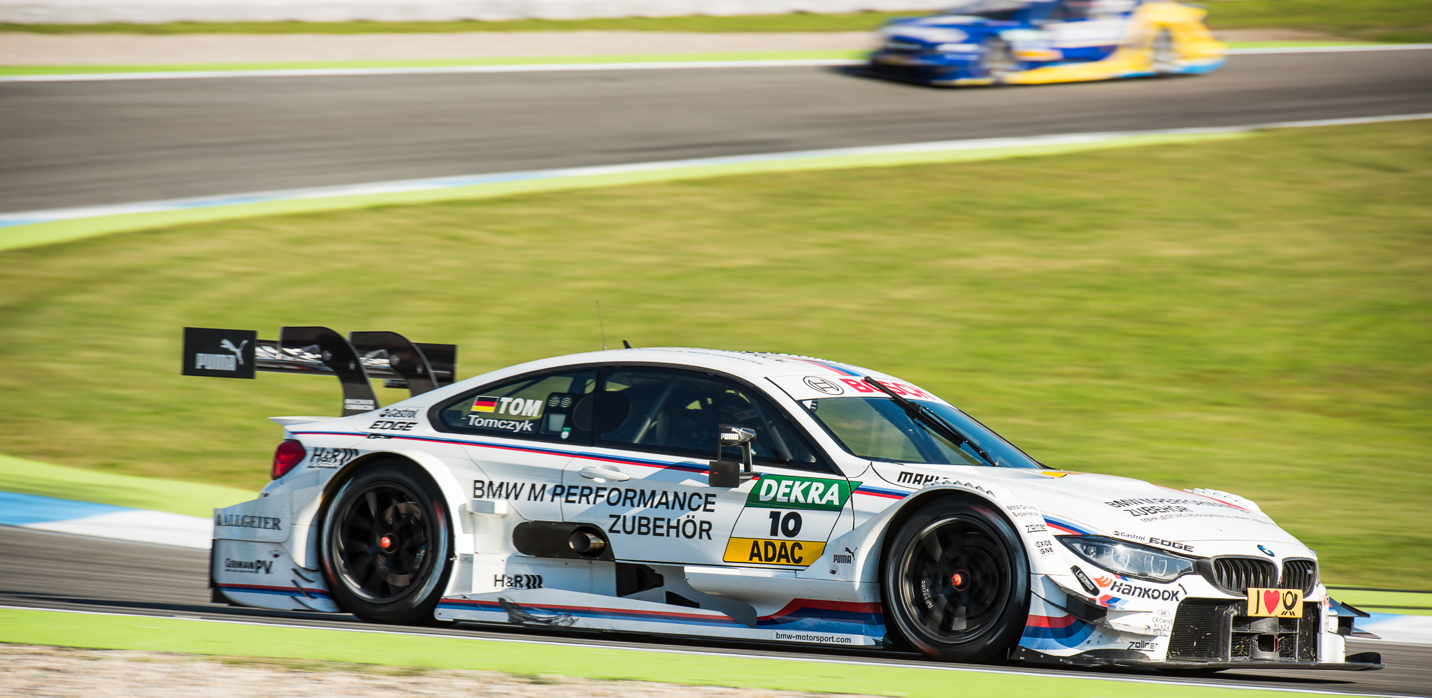 BMW M Performance Zubehör M4 DTM,DTM,Deutsche Tourenwagen Masters,Hockenheimring,Martin Tomczyk,Motorsport